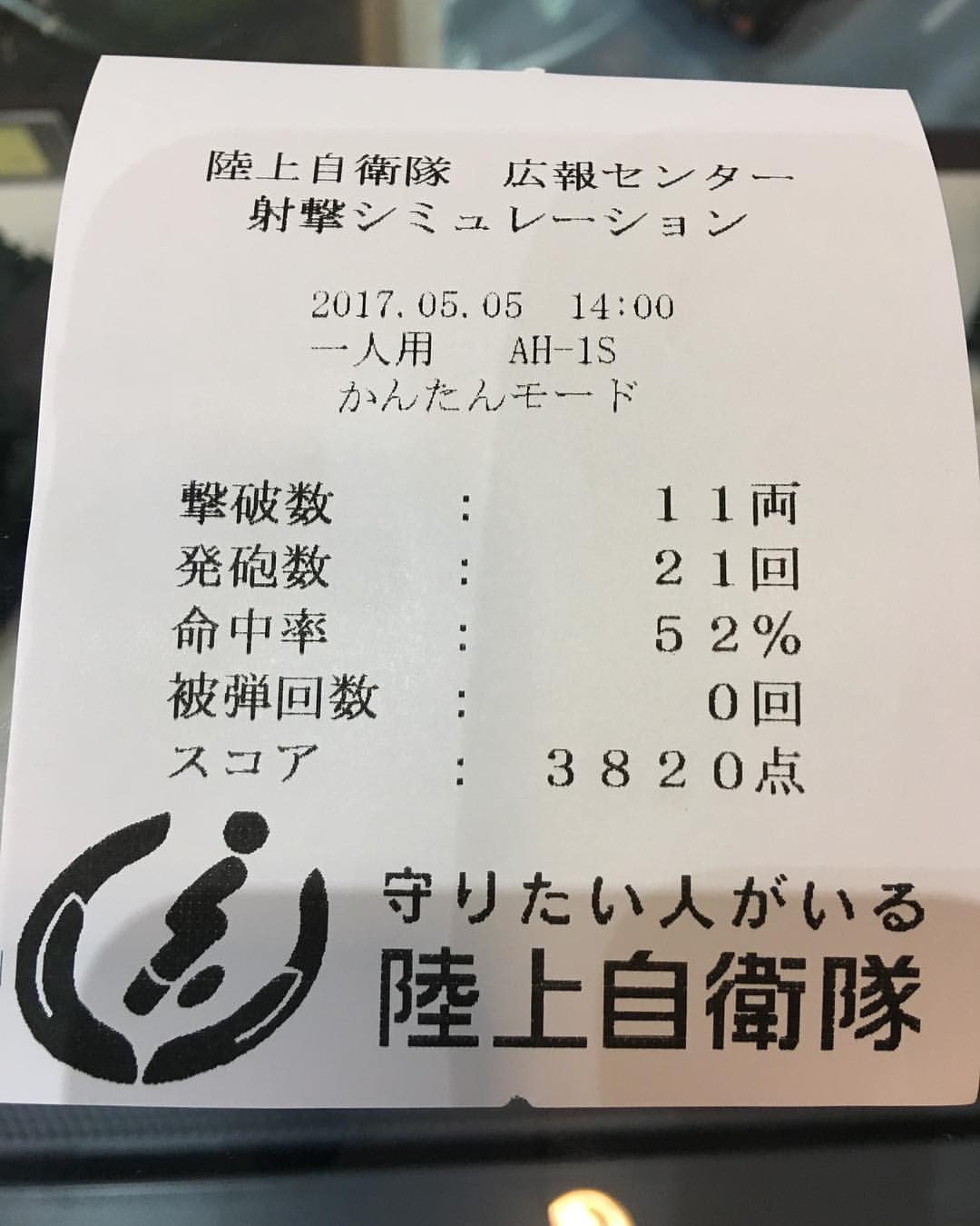 戦果。無駄玉打ちすぎ。